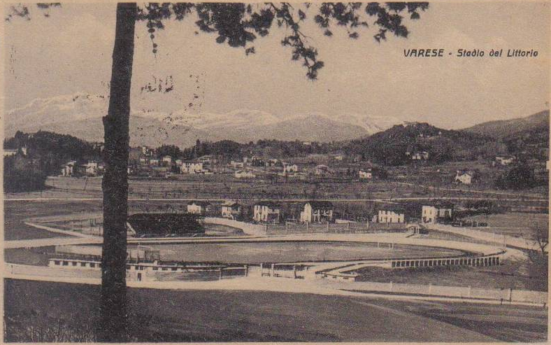 Lo Stadio del Littorio (poi Stadio Franco Ossola) di Varese attorno negli anni 1930